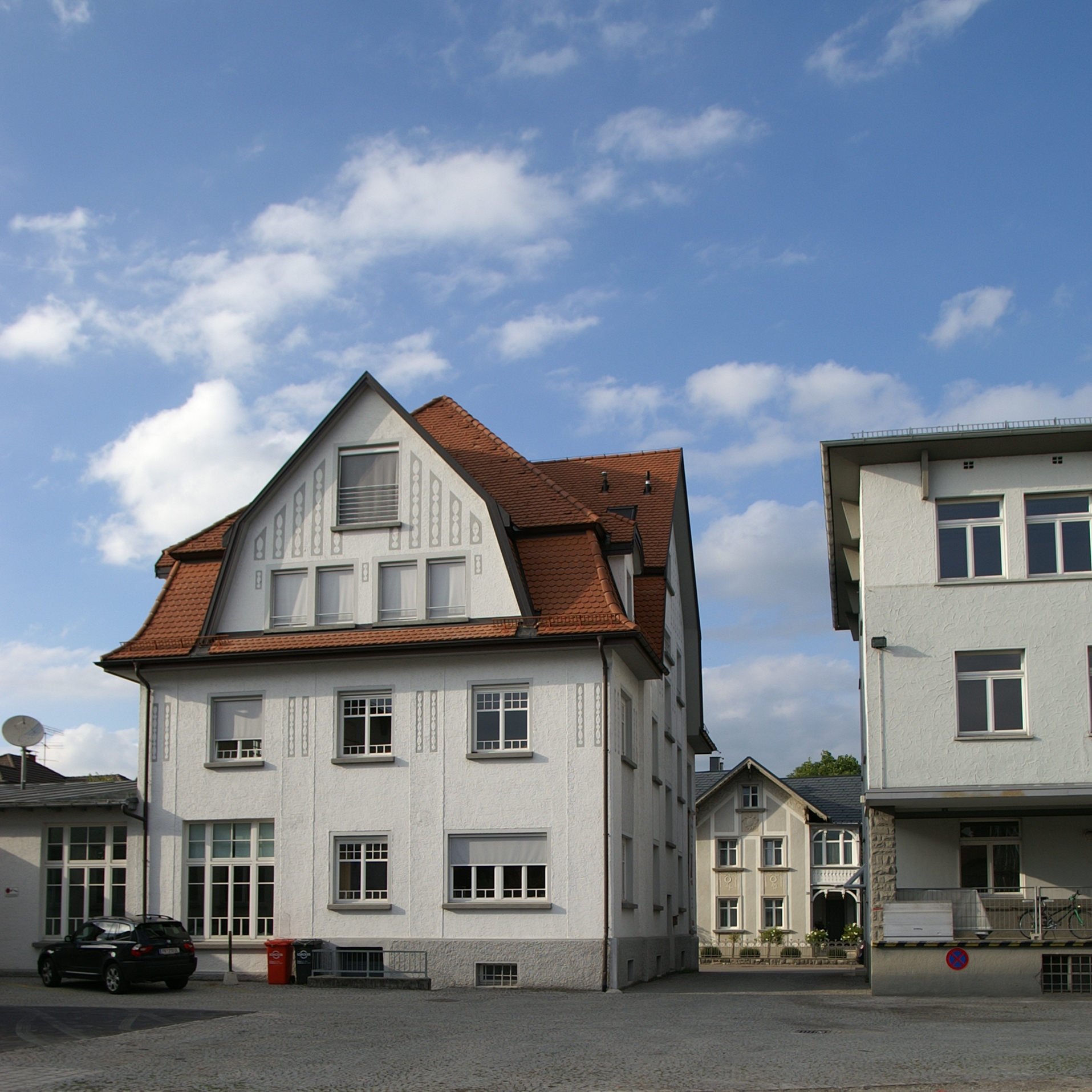 Stickerei Gerbüder Längle-Frixa; Jugendstilvilla mit Mansarddach an der Schweizerstrasse 38 und Textilfabrik Nr.35 in Altach, Vorarlberg Architekt: Baujahr: Bauherr